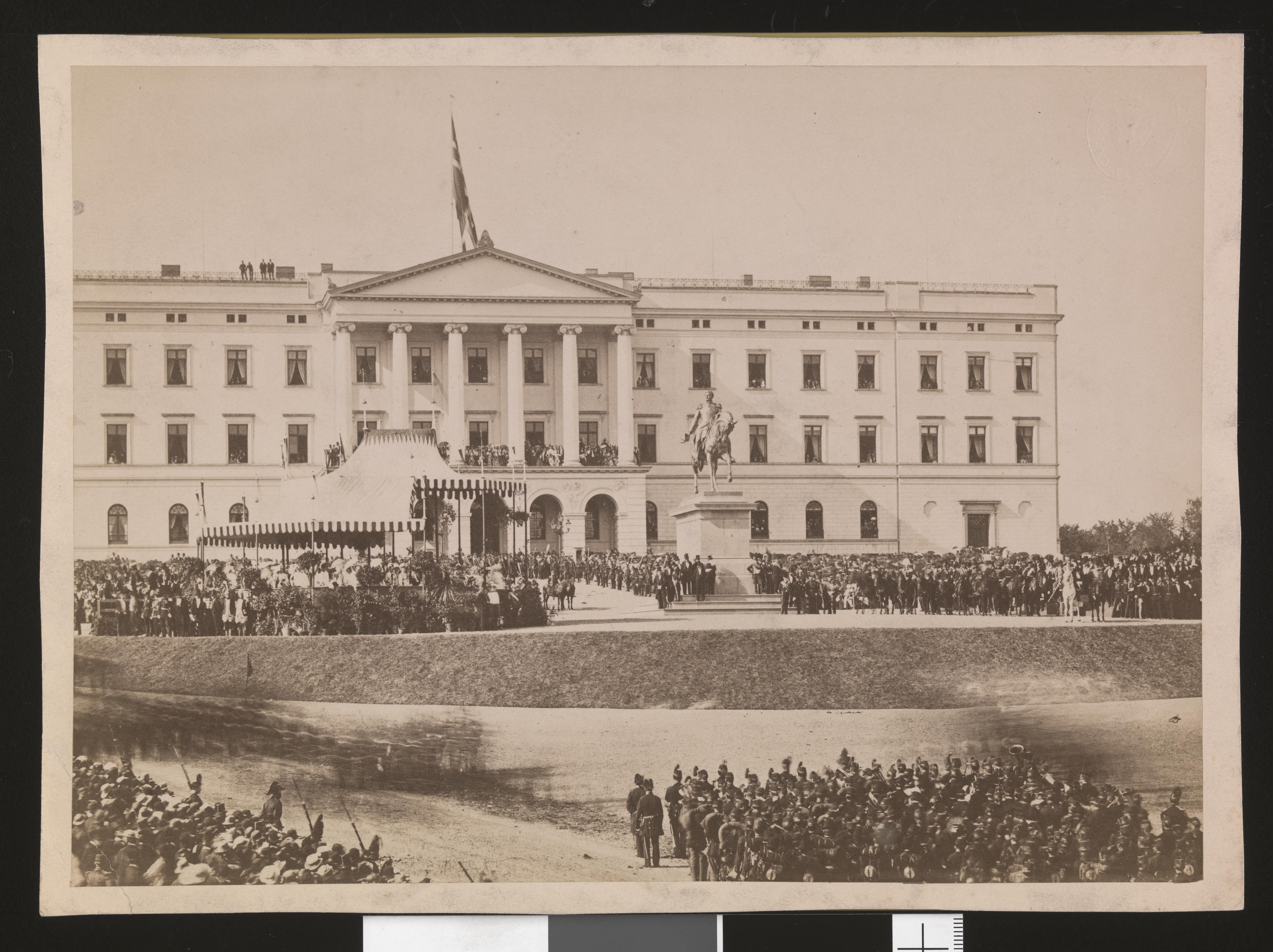 Bildet er hentet fra Nasjonalbibliotekets bildesamling. Anmerkninger til bildet var: Tittel hentet fra påskrift på komponentnr 1 Karl Johans gate, Oslo, Oslo